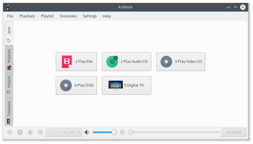 kaffeine 1.0